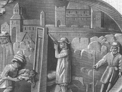 Średniowieczny widok Zamku Królewskiego w Kaliszu, fragment ryciny